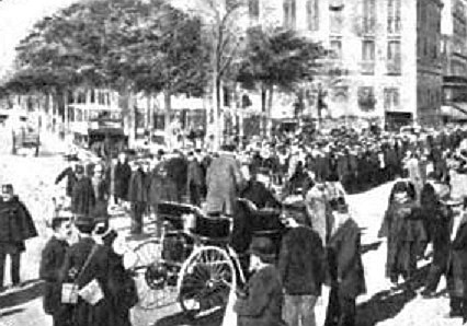 Départ de Paris-Bordeaux-Paris, place de l'Étoile (11 juin 1895), (Histoire de l'Automobile, Pierre Souvestre, 1907, p.289)